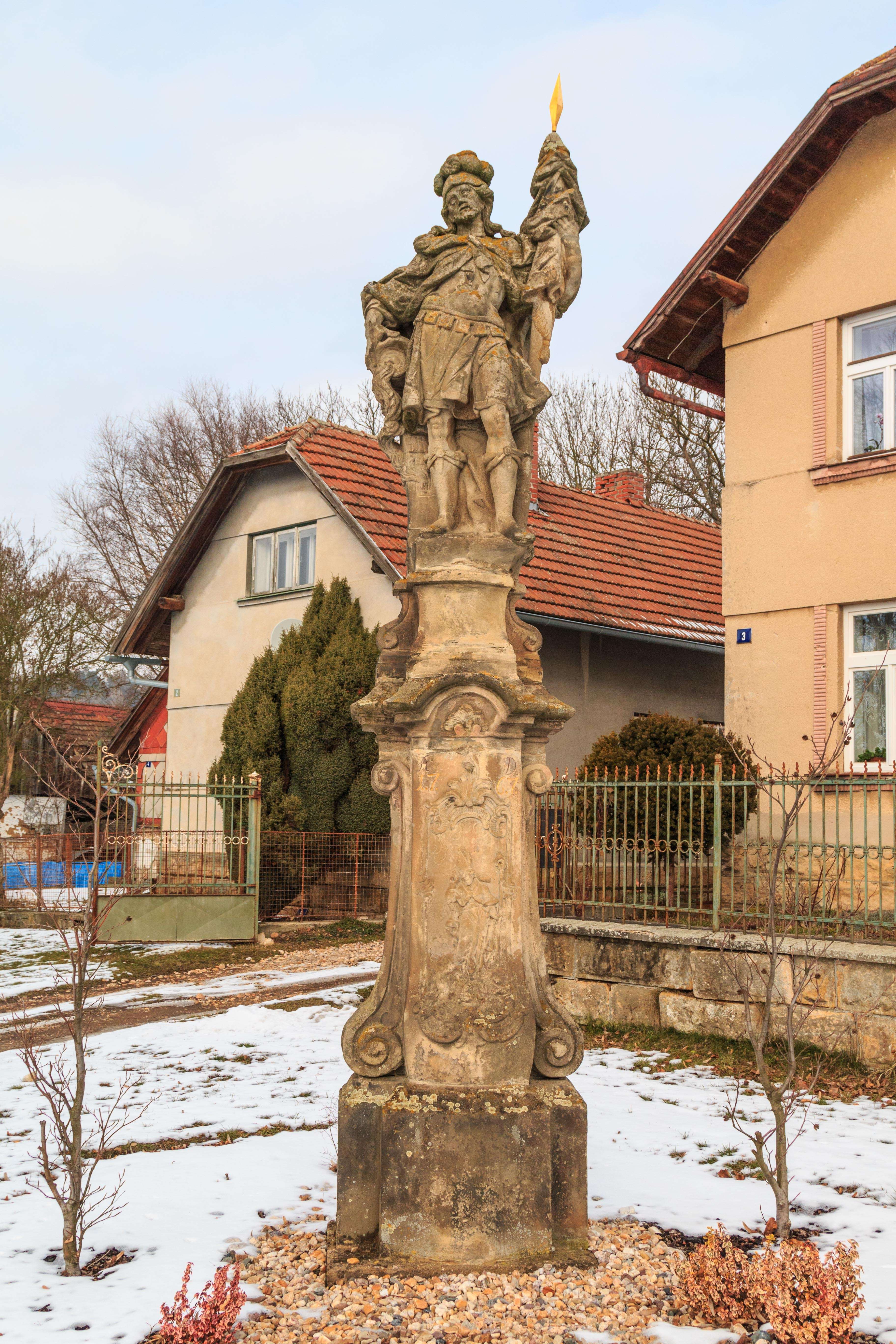 Sloup se sochou svatého Floriána, před čp. 3, Střevač.